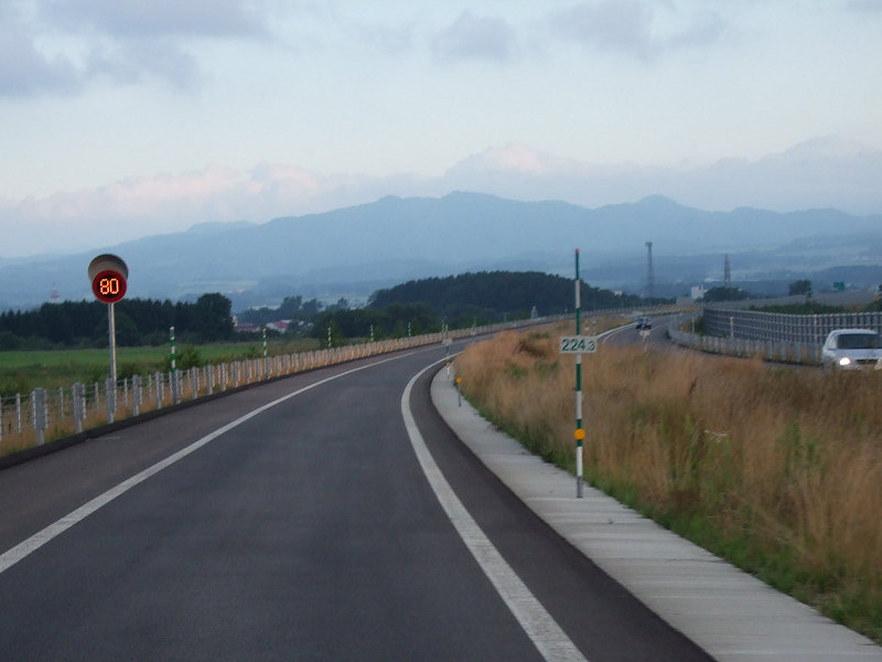 Hokkaido EXPWY.